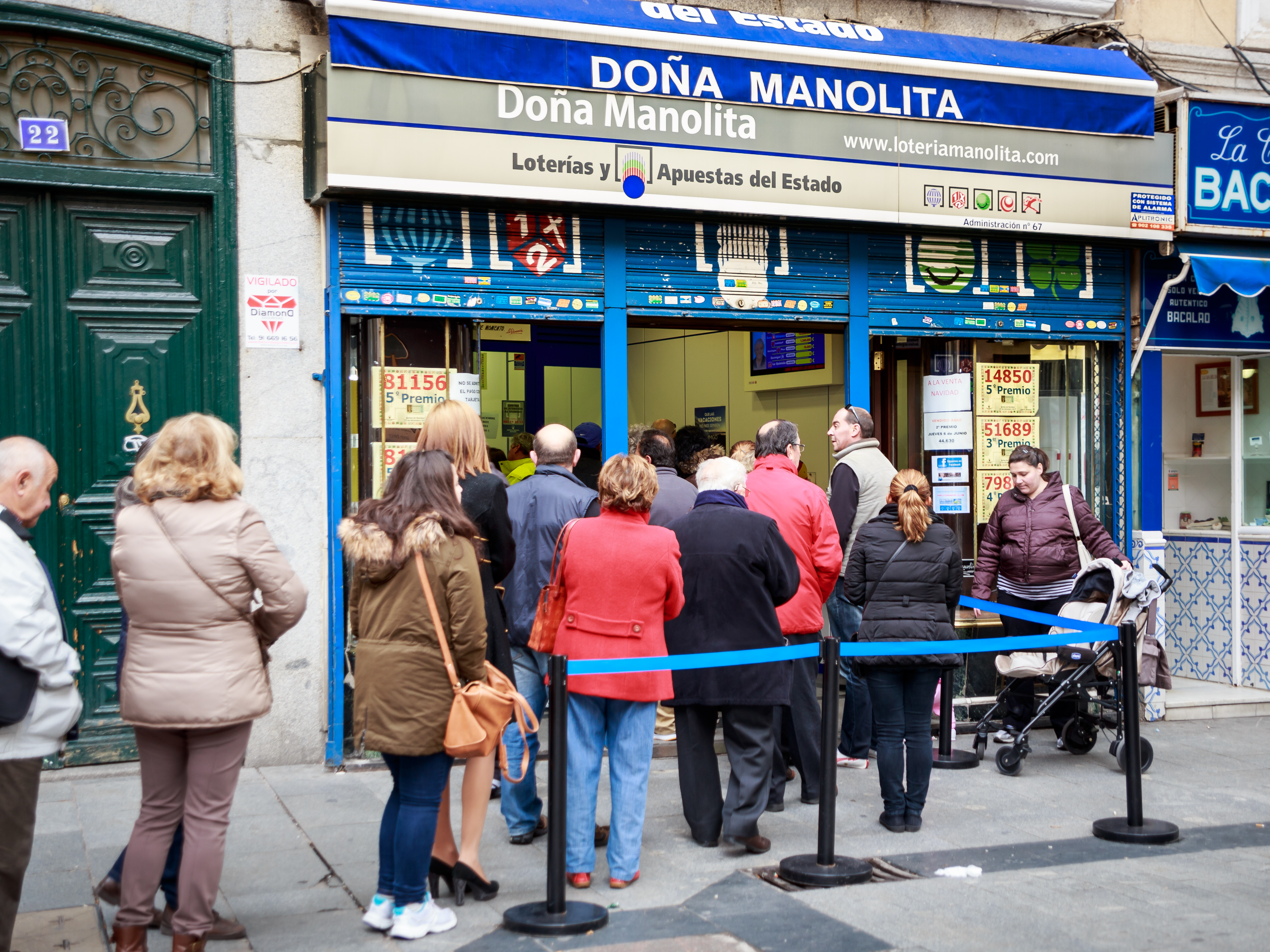 Gente comprando lotería de navidad en la agencia Doña Manolita, Madrid.